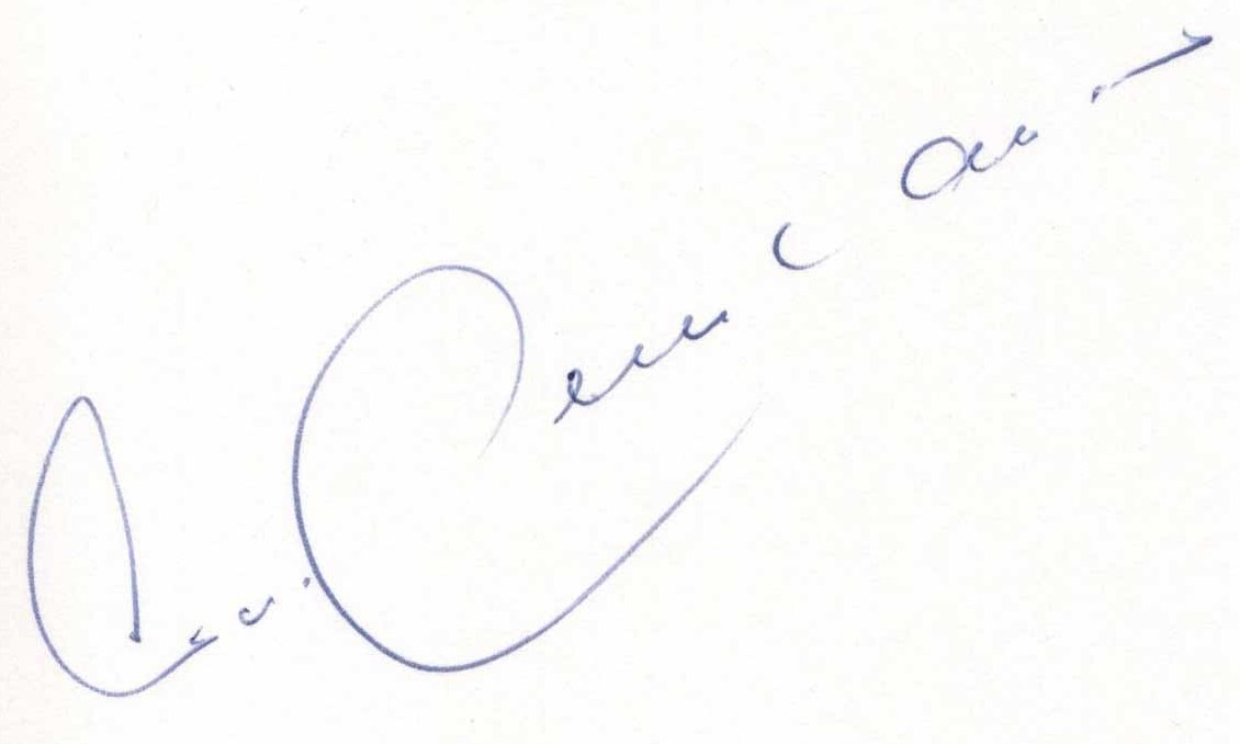 Von Franz Beckenbauer persönlich unterschriebene Notizbuchseite während der Halbzeitpause des Länderspiels Deutschland gegen Finnland (2:0) zur EM-Qualifikation im damaligen Frankenstadion in Nürnberg am Mittwoch, 31. März 1999